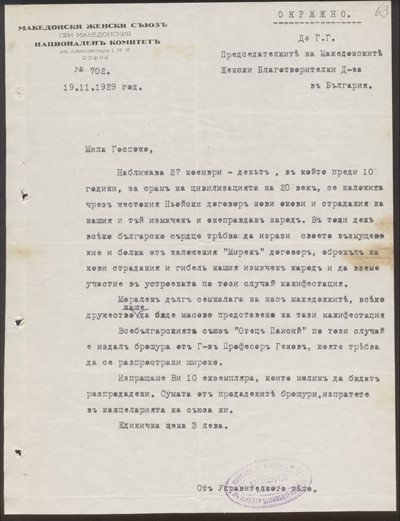 Документ на Македонския женски съюз